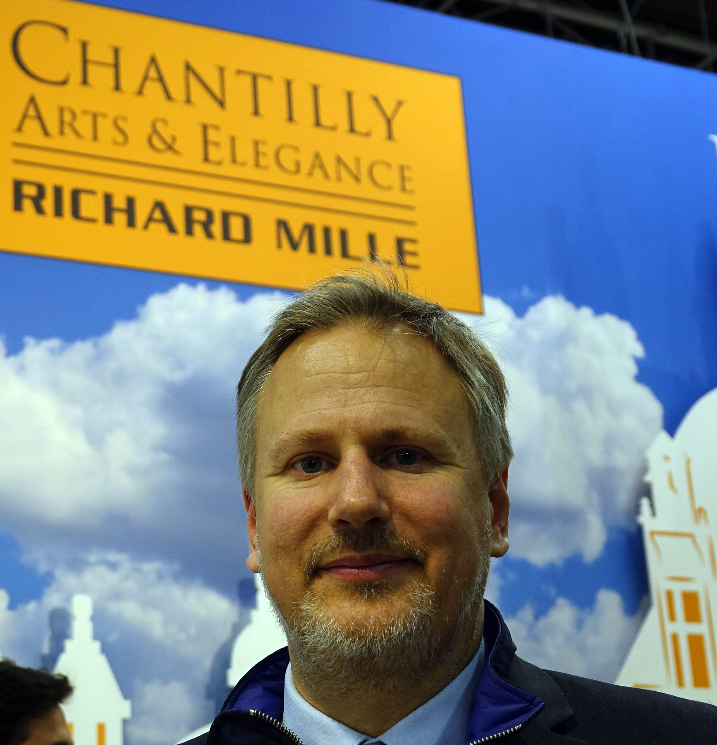 Grégory Miellou (Peter Auto) - Rétromobile 2019